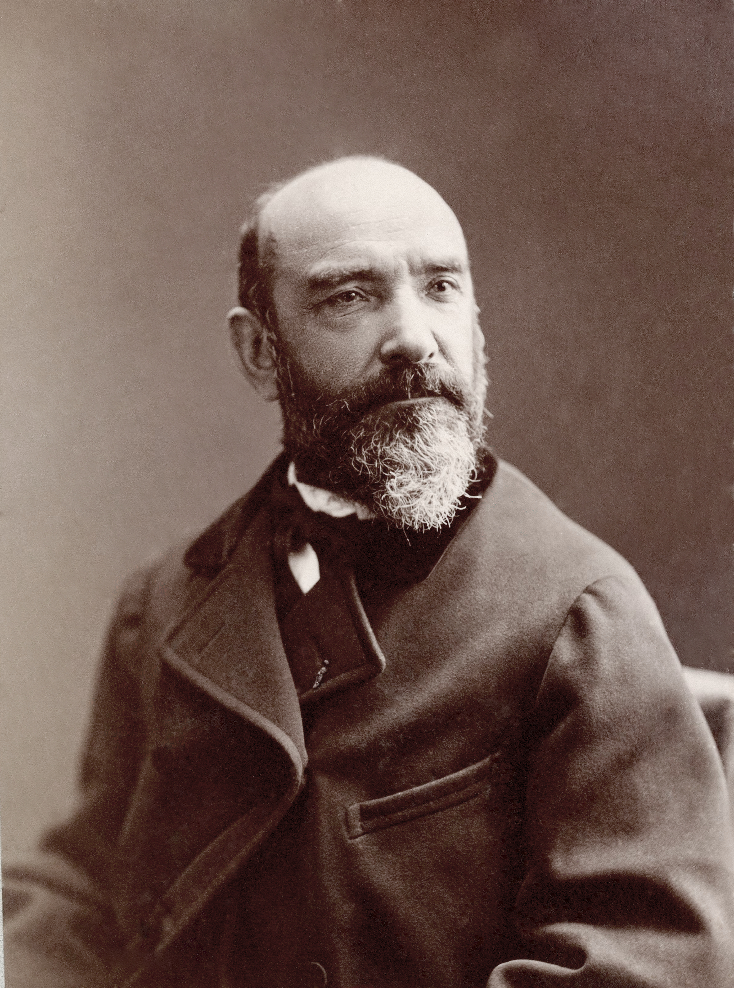 Adolphe Leleux (1812 - 1891), peintre français